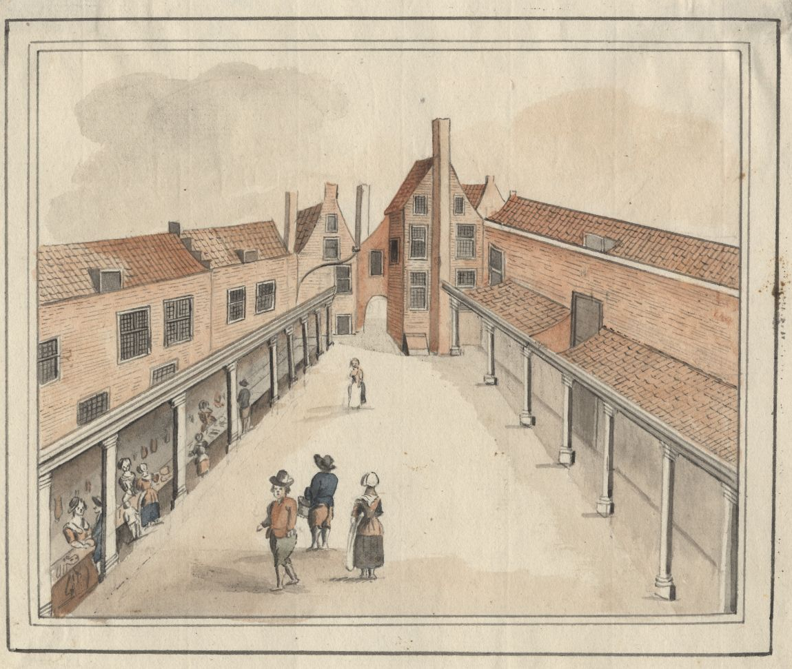 Penshal tussen Breestraat en Langebrug naar de Langebrug gezien. (Achtergevels van Langebrug 28 en 30). Jacob Timmermans, ca. 1788.